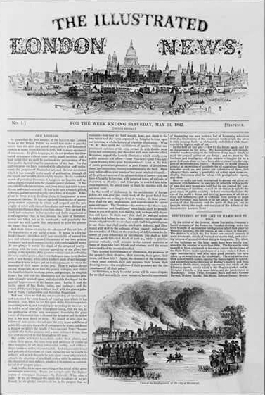 Zeitungsbericht der London News im Mai 1842 zum Hamburger Brand.